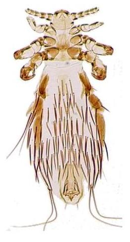 Fahrenholzia pinnata under a light microscope